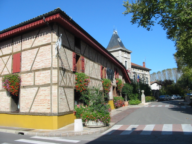 Village de Vonnas Georges Blanc